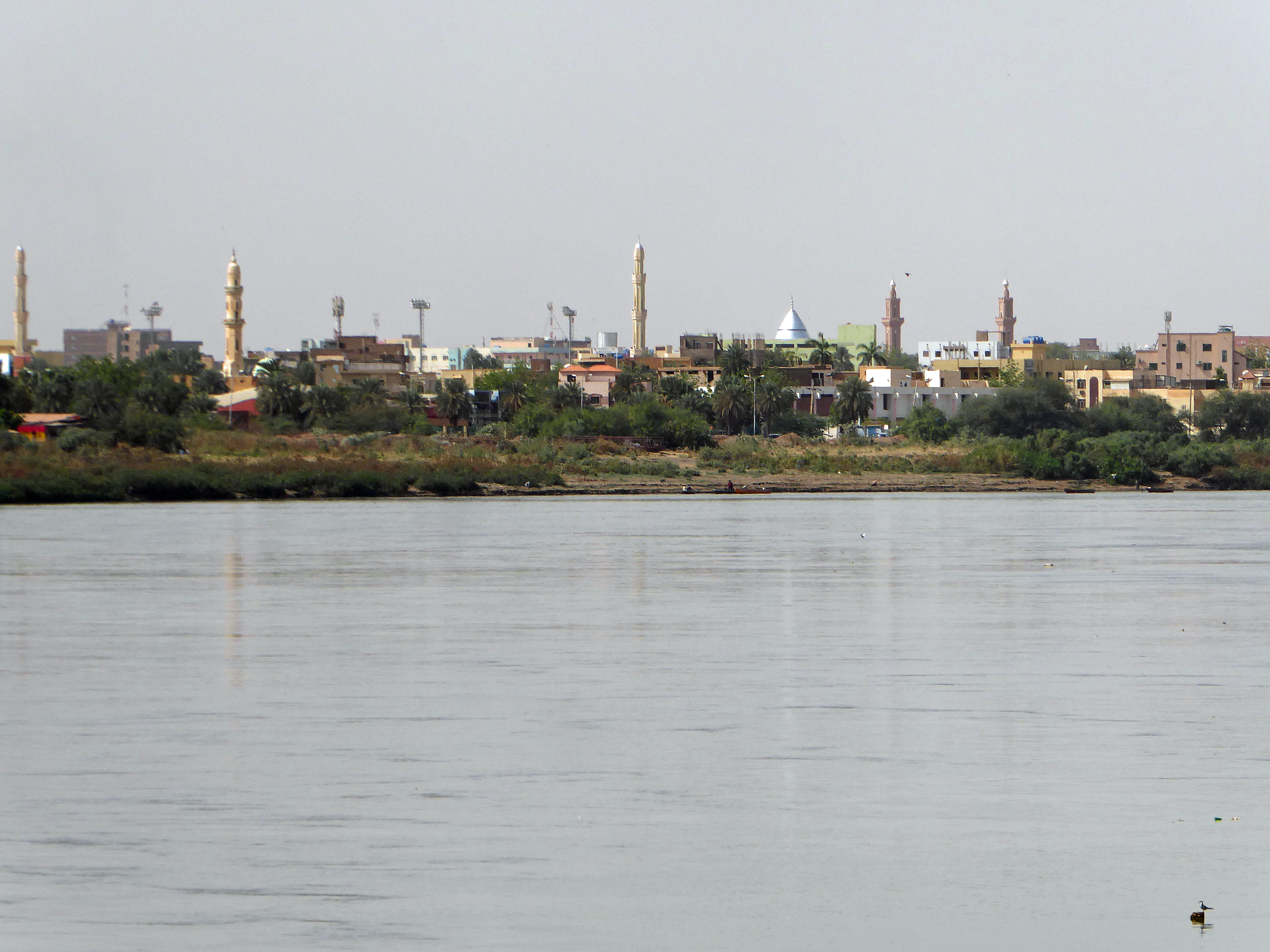 Omdurman